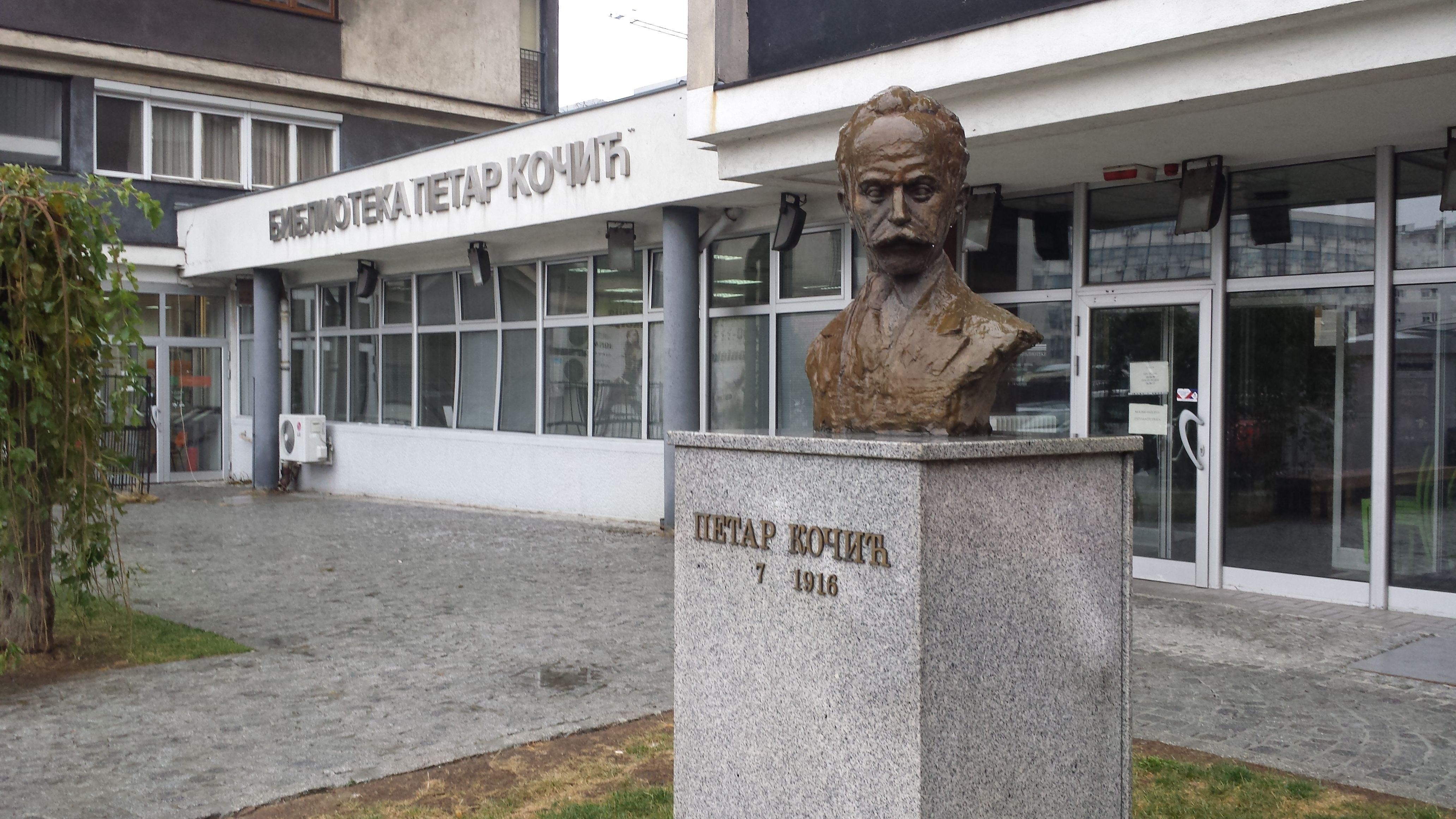 Biblioteka "Petar Kočić" na Vračaru- ulaz u biblioteku "Petar Kočić"